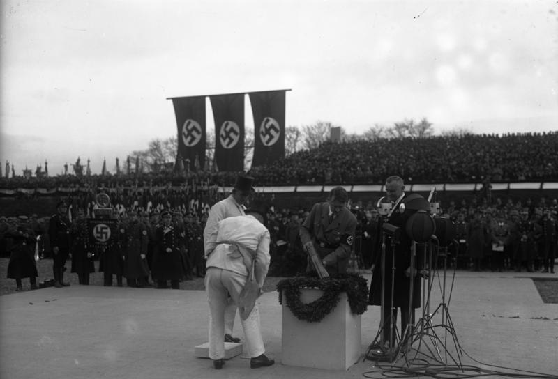 Die feierliche Grundsteinlegung zum Richard Wagner-National-Denkmal des deutschen Volkes in Leipzig, durch den Reichskanzler Adolf Hitler am 6. März 1934. [Text Bild 102-15589]